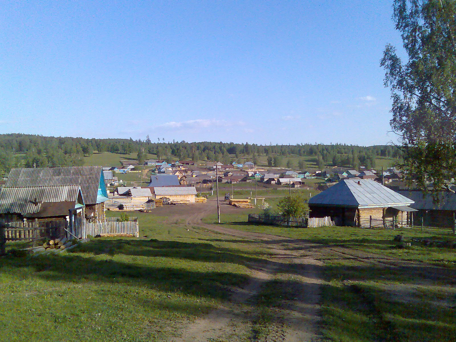 Деревня Шарипово, Абзелиловский район